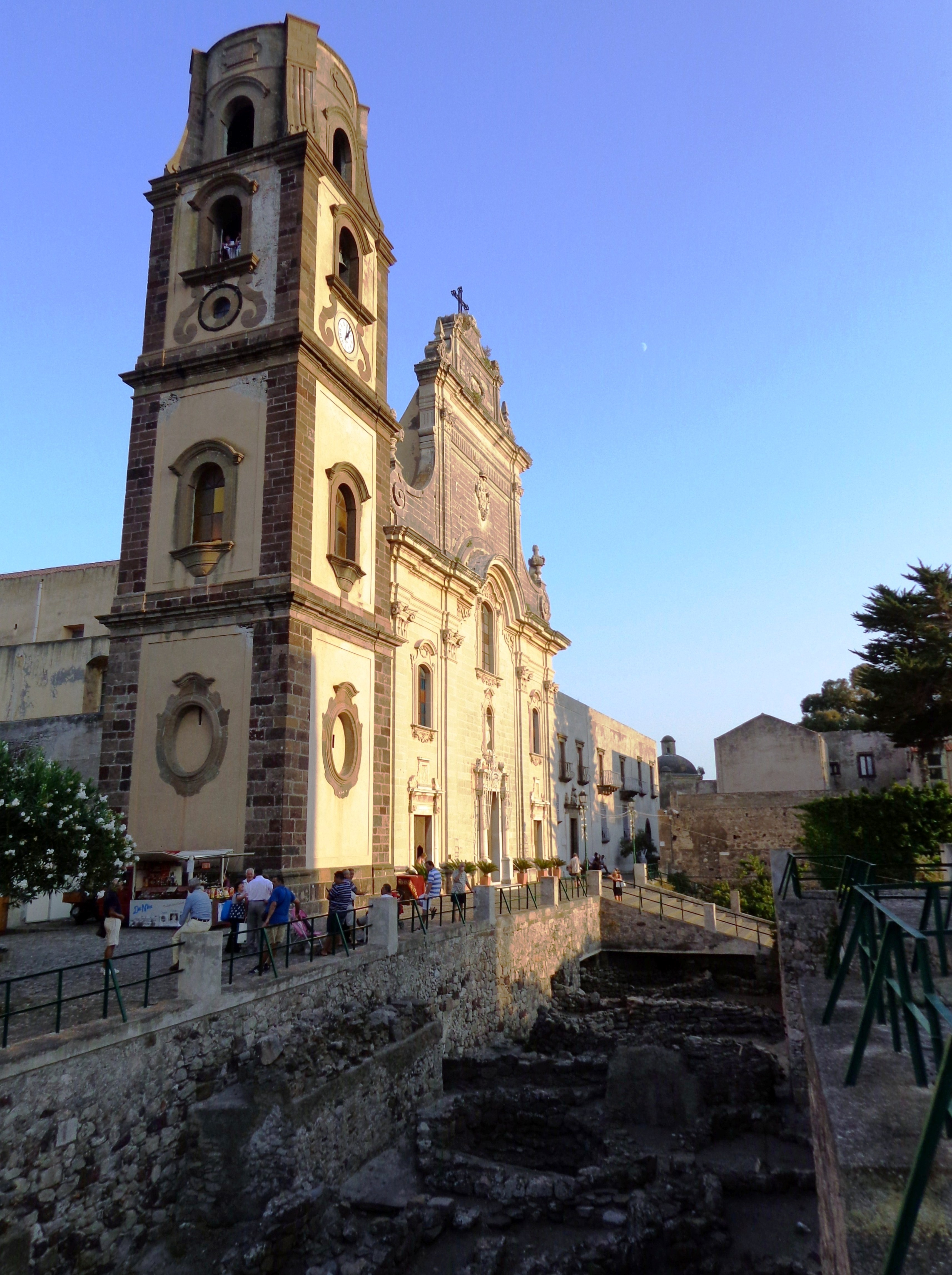 veduta uno